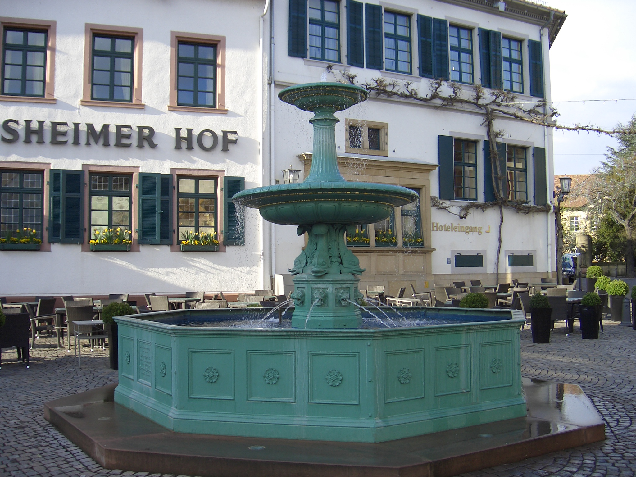 Der Andreasbrunnen auf dem Marktplatz von Deidesheim im Jahr 2010. Er wurde 1851 von Ludwig Andreas Jordan (1811-1883) gestiftet, zu Ehren seines Vaters, des Bürgermeisters von Deidesheim Andreas Jordan (1775-1848).